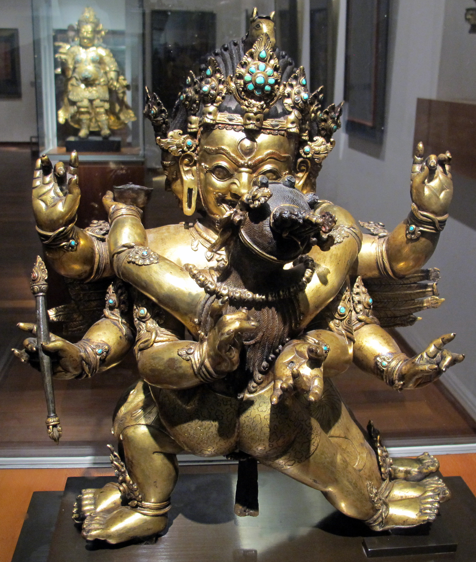 Tibet, Hayagriva, guardiano della dottrina dharmapala, e la sua consorte, 1490-1510 ca.